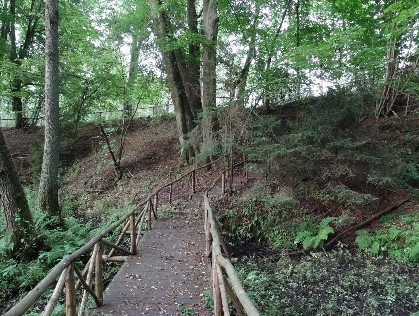 Stawy, źródliska i bagna na Strudze Otorowskiej w Puszczy Bydgoskiej, w pobliżu wsi Rudy